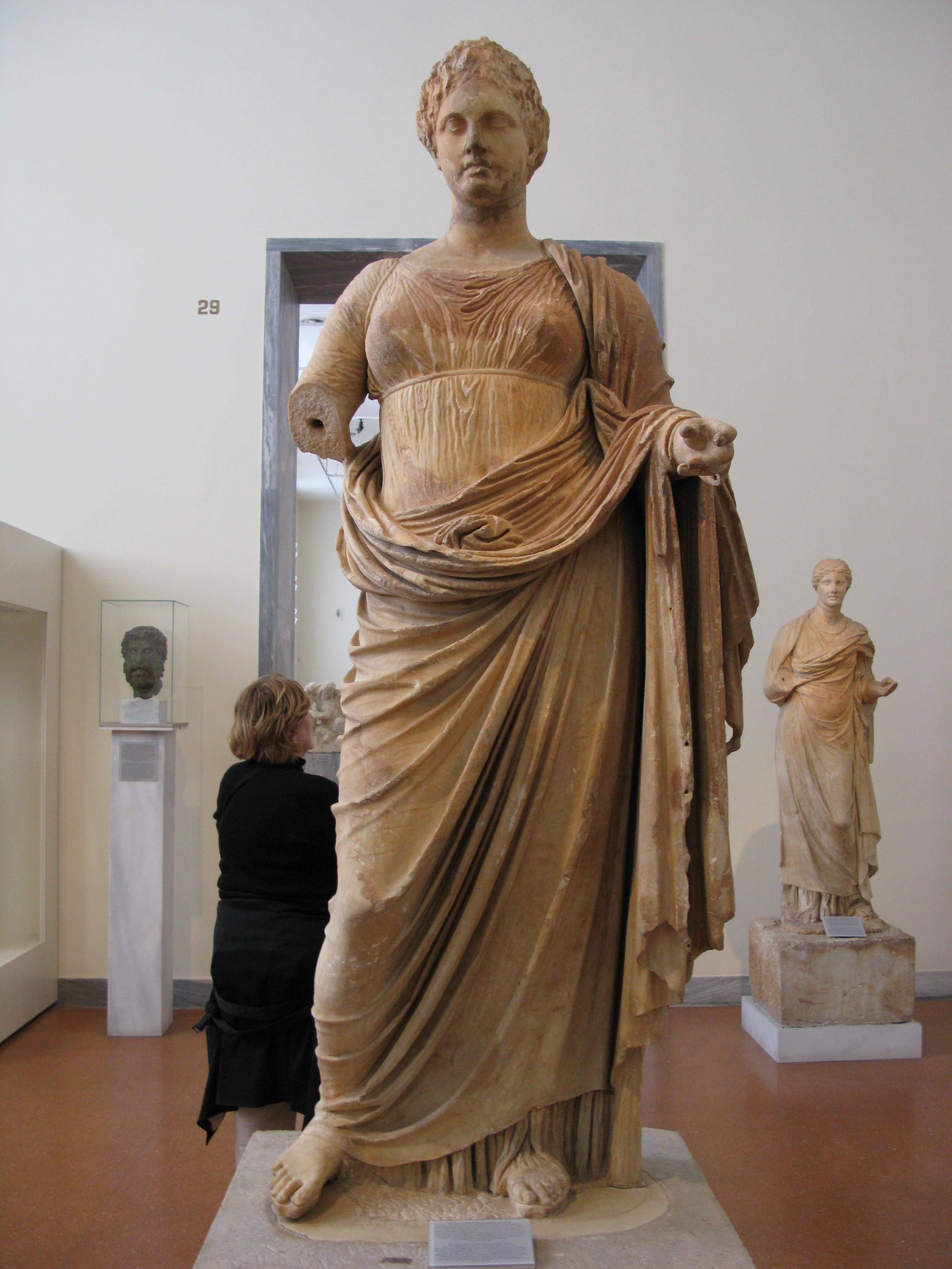 231. Statue of the goddess Themis. Pentelic marble. Found at Rhamnous, Attica, in the small temple of Nemesis. The goddess wears a high-girt chiton, richly draped himation and sandals. The head is inlaid and the right arm was made of a separate piece of marble. Themis, daughter of Ouranos and Gaia, was goddess of justice and at Rhamnous she was worshipped in the same temple as Nemesis. According to the inscription on the front of the base, the statue was carved by Chairestratos of Rhamnous and was dedicated to Themis by Megakles. About 300 BC. National Archaeological Museum, Athens, Greece. --- 231. Άγαλμα της θεάς Θέμιδος. Μάρμαρο πεντελικό. Βρέθηκε στον Ραμνούντα Αττικής, μέσα στο μικρό ναό της Νεμεσεως. Η θεά φορεί ψηλά ζωσμένο χιτώνα, πλούσια πτυχωμένο ιμάτιο και σανδάλια. Το κεφάλι είναι ένθετο και το δεξί χέρι ήταν πρόσθετο από ξεχωριστό κομμάτι μαρμάρου. Η Θέμις, κόρη του Ουρανού και της Γης, ήταν θεά της δικαιοσύνης και στον Ραμνούντα λατρευόταν στον ίδιο ναό με τη Νέμεση. Στην πρόσθιο όψη του βάθρου υπάρχει επιγραφή σύμφωνα με την οποία το άγαλμα, το οποίο φιλοτέχνησε ο Χαιρέστρατος από τον Ραμνούντα, ήταν αφιέρωμα του Μεγακλέους στη θέμιδα. Γύρω στο 300 π.Χ. Εθνικό Αρχαιολογική Μουσείο. Αθήνα.